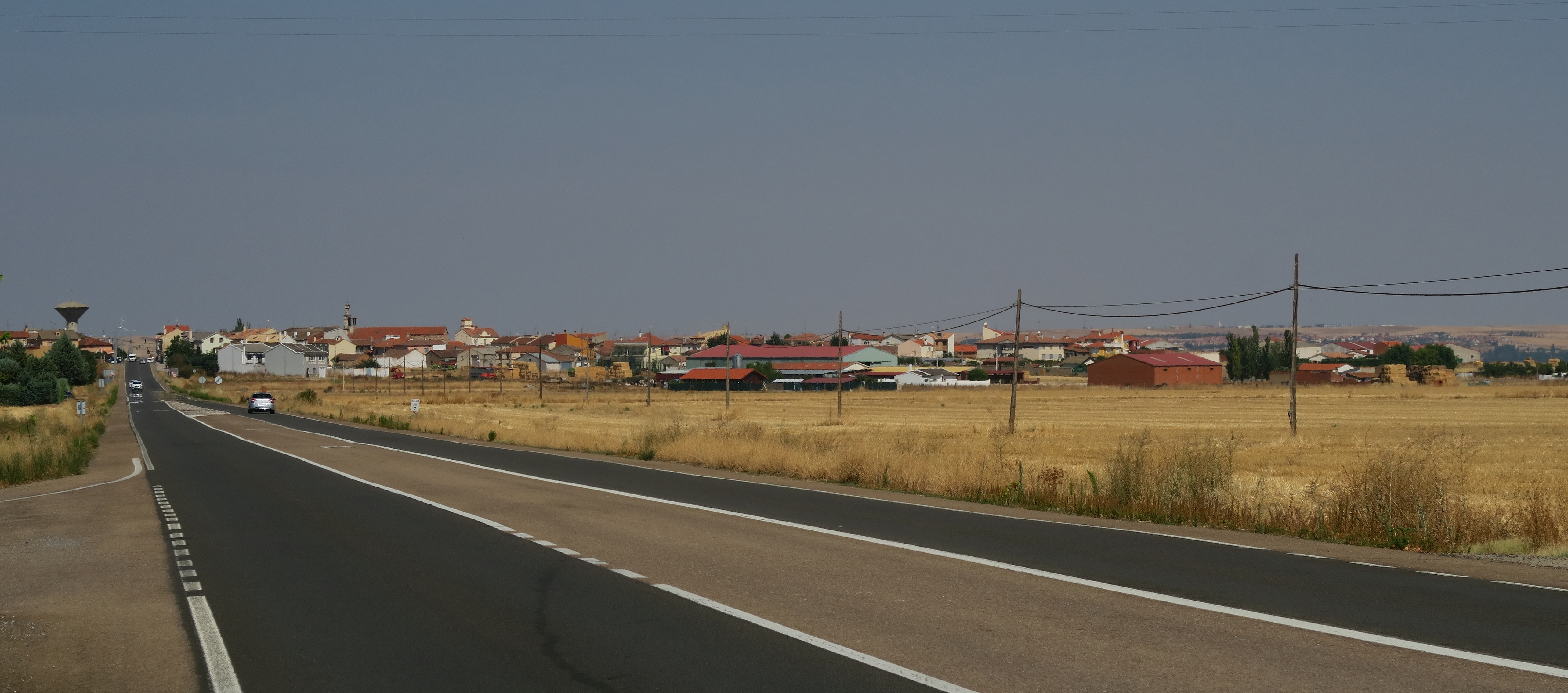 Vista de Calvarrasa de Arriba desde CL-510